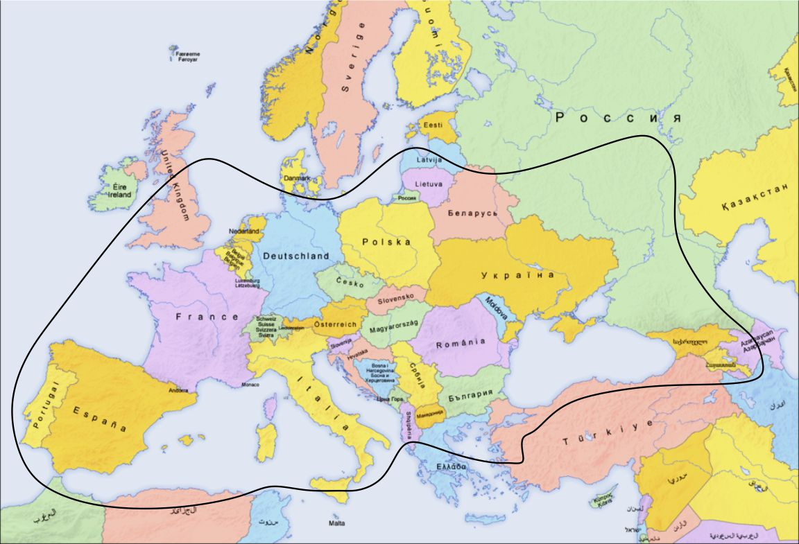 Zone géographique des ancêtres sauvages du Pyrus communis L